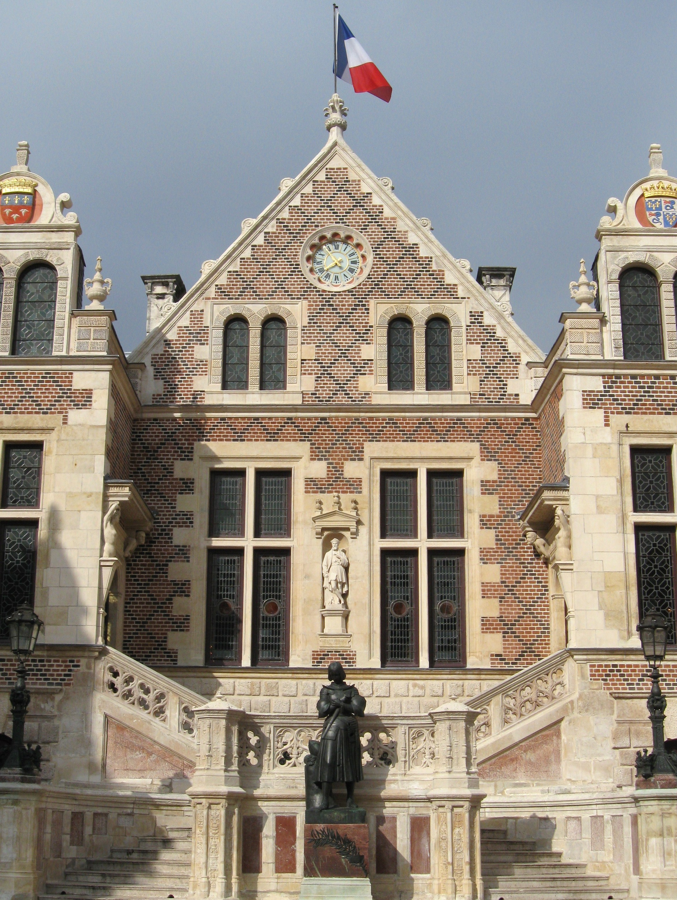 Hôtel Groslot, siège de l'Hôtel de Ville, et statue de Jeanne d'Arc, œuvre de Marie d'Orléans (1813-1839), Orléans, Loiret, Centre, France